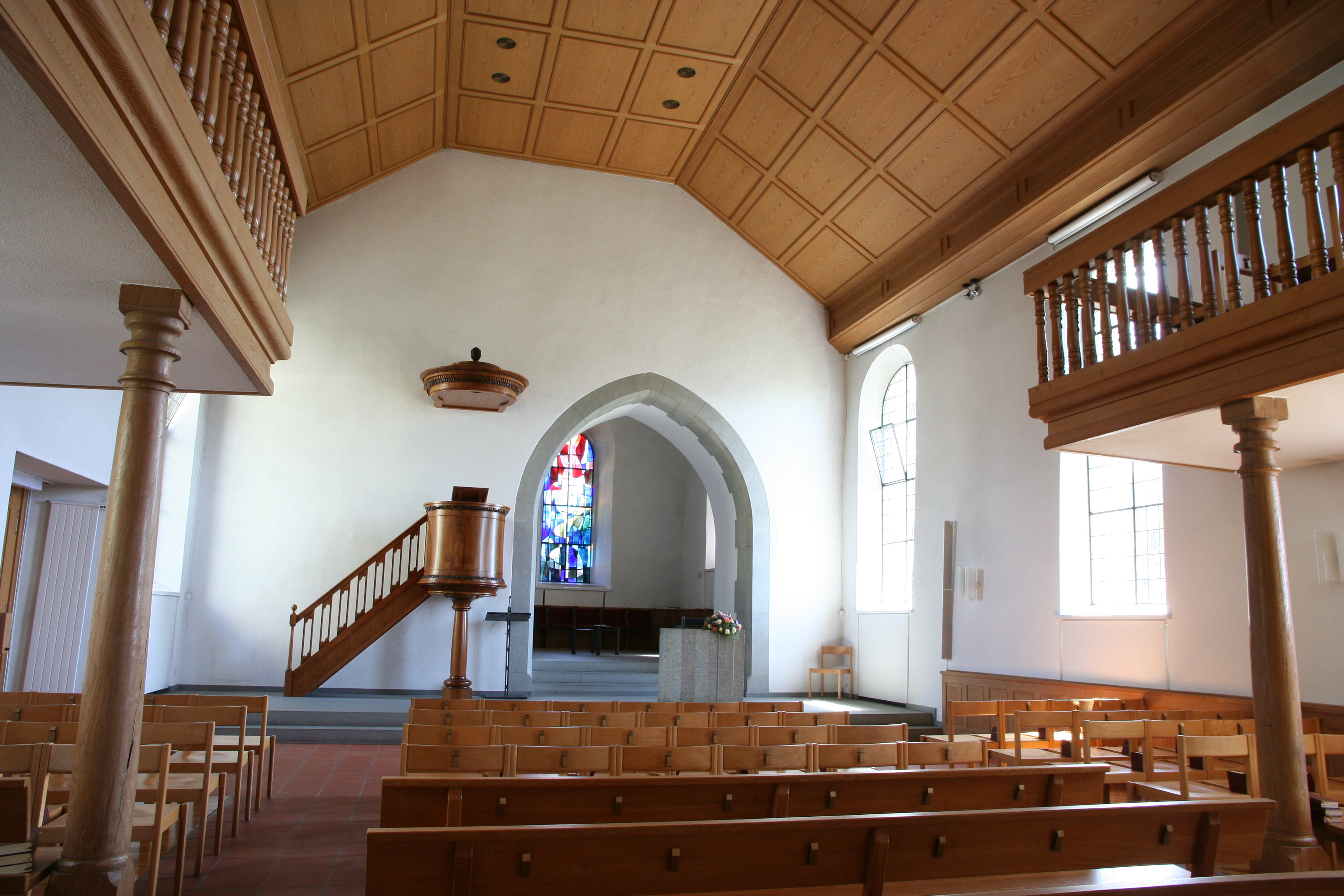 Evangelisch-reformierte Kirche Zürich-Höngg